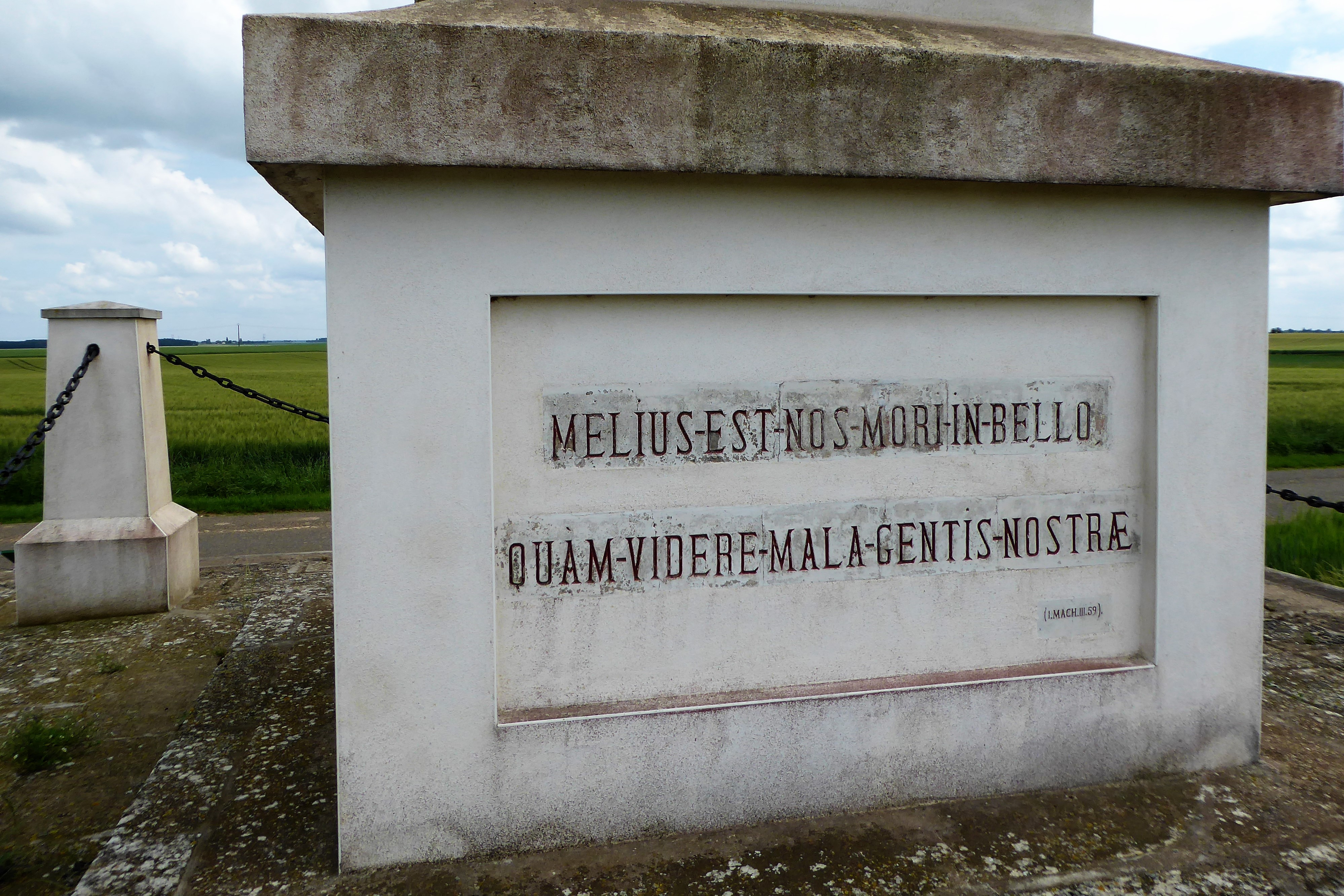 Combats de Lumeau, 2 décembre 1870 ; citation latine du monument aux morts à Neuvilliers, Lumeau, Eure-et-Loir, France. "Melius est nos mori in bello quam videre mala gentis nostrae" ("Il vaut mieux pour nous mourir que d’être spectateurs des malheurs de notre nation"), Premier livre des Macchabées (1 Mac 3, 59).